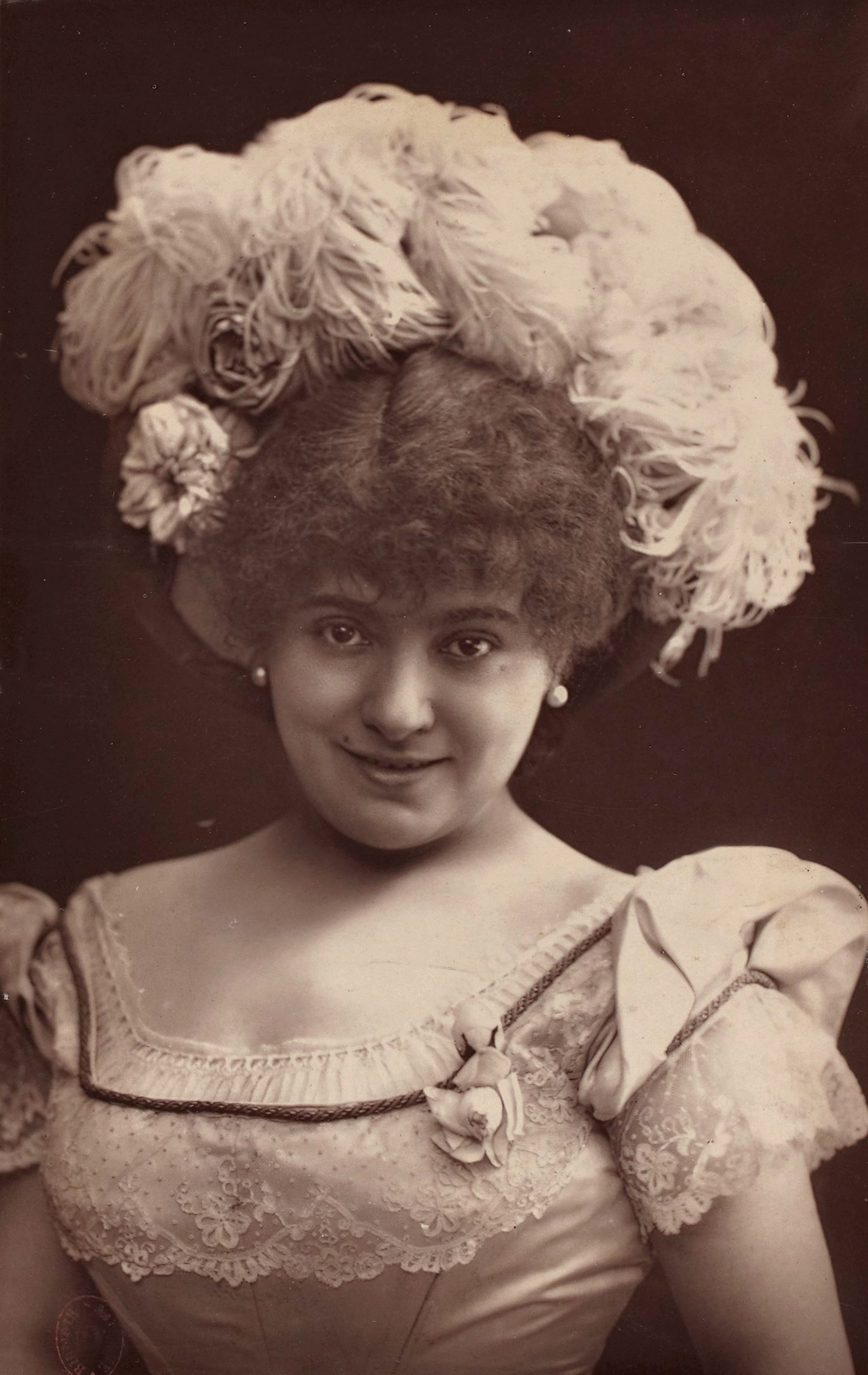 Photoglyptie de Louise Théo, photo Benque et Cie, Paris. Publiée dans Paris-Artiste, n°5, 17 novembre 1883. Image restaurée.